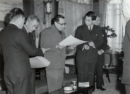 Su Alteza Imperial, el Principe Takamatsu, hermano del Emperador del Japón, hece entrega del Pergamino-Diploma correspondiente al 1er lugar del Concurso Internacional de Filosofía Oriental al catedrático Dr. Adalberto García de Mendoza.